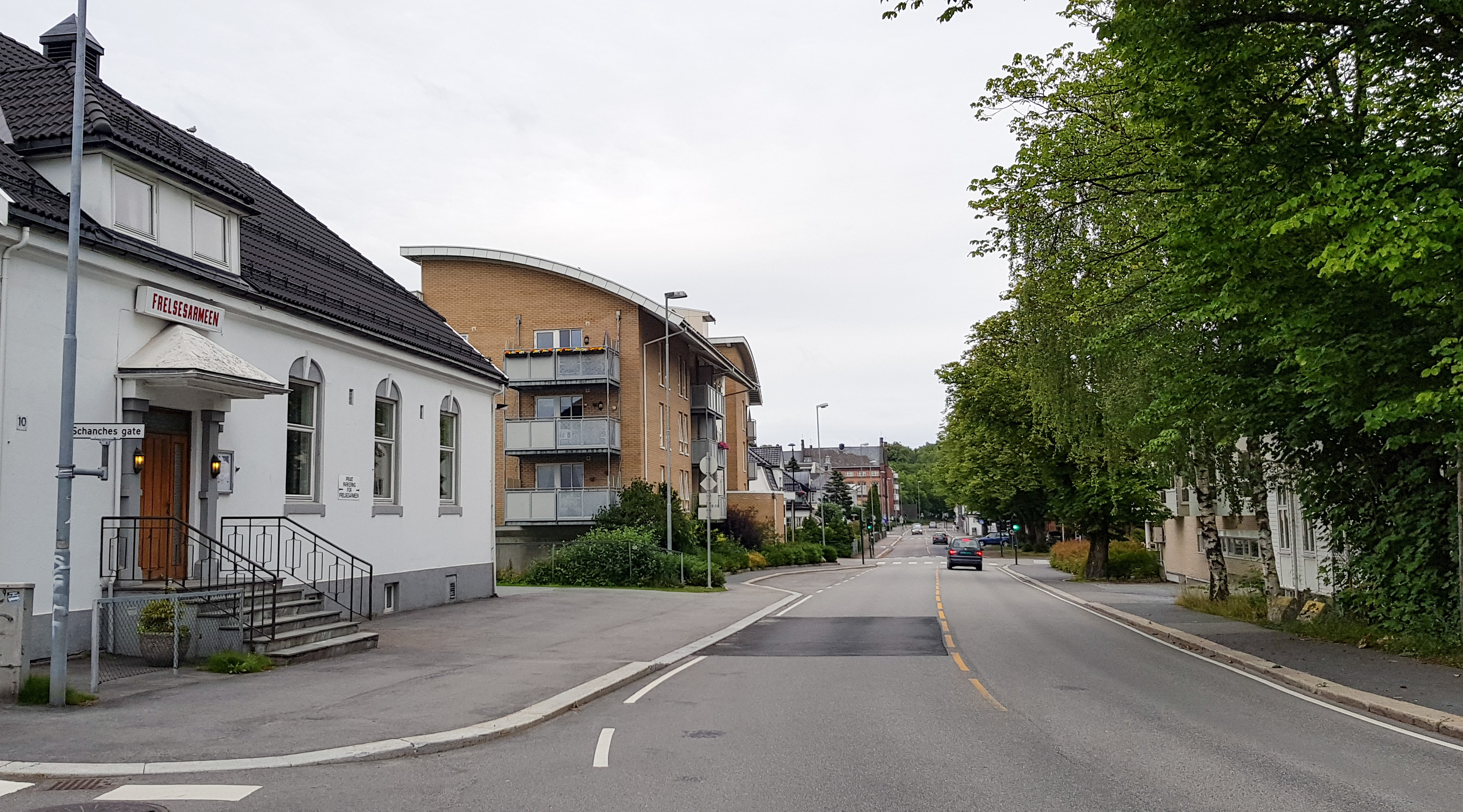 Landstads gate, Sandefjord